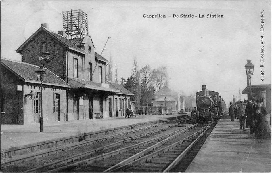 La gare avec son ancien bâtiment et une desserte vapeur vers 1911.